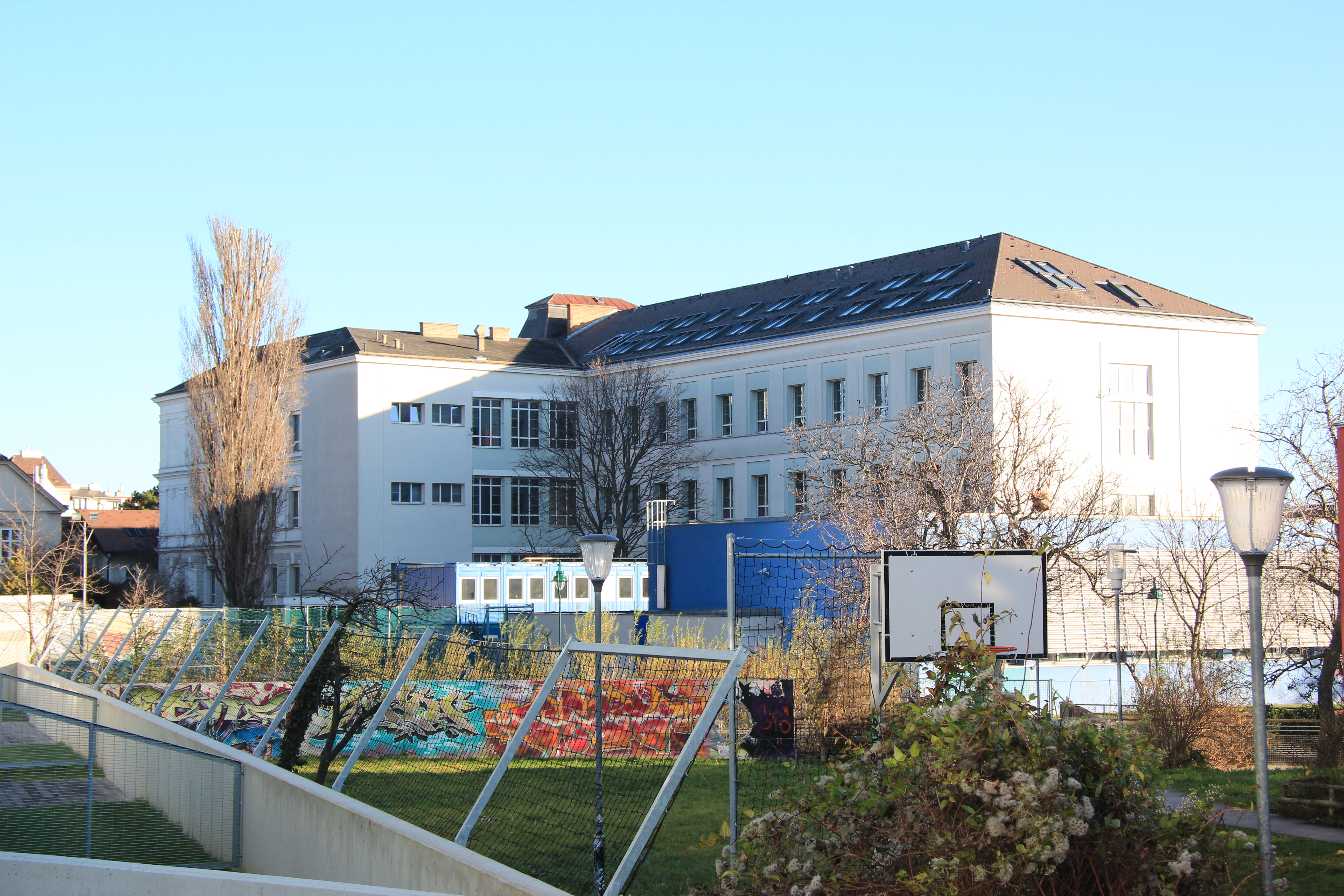 Rückseite des Gymnasiums Keimgasse in Mödling